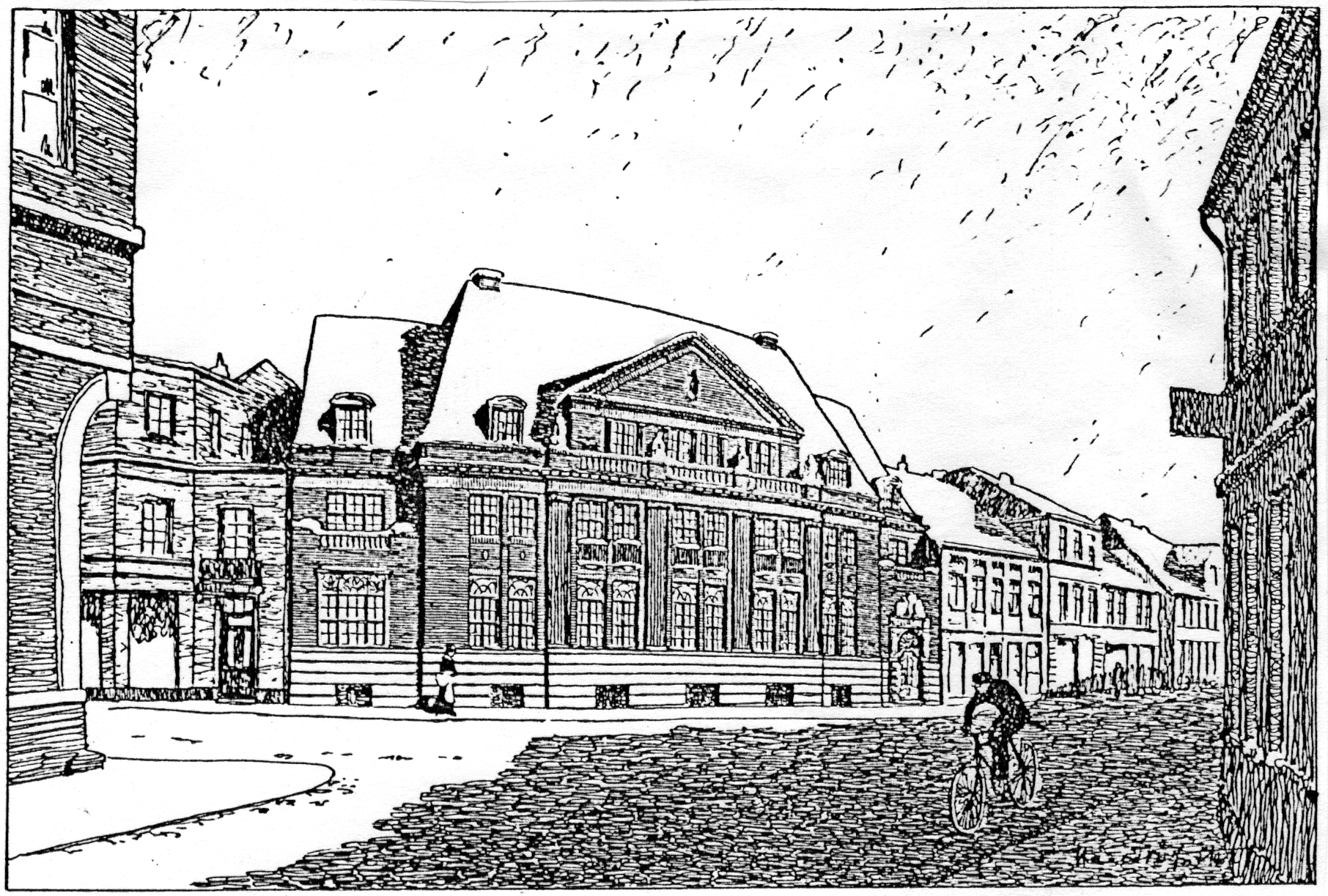 Neubau eines Bankhauses in Segeberg